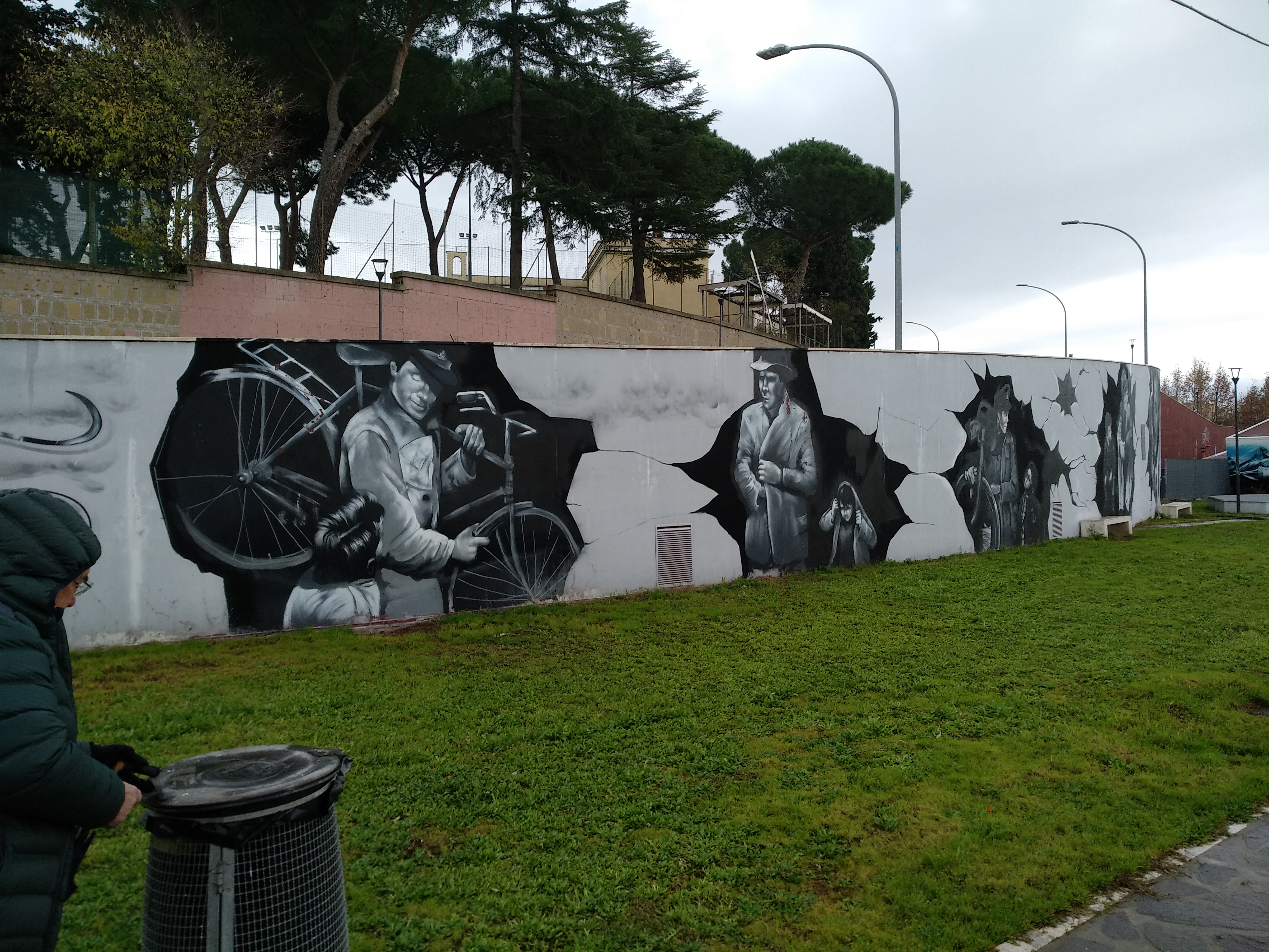 il gruppo "Visure Acatastali" in visita al Tufello nel 2018